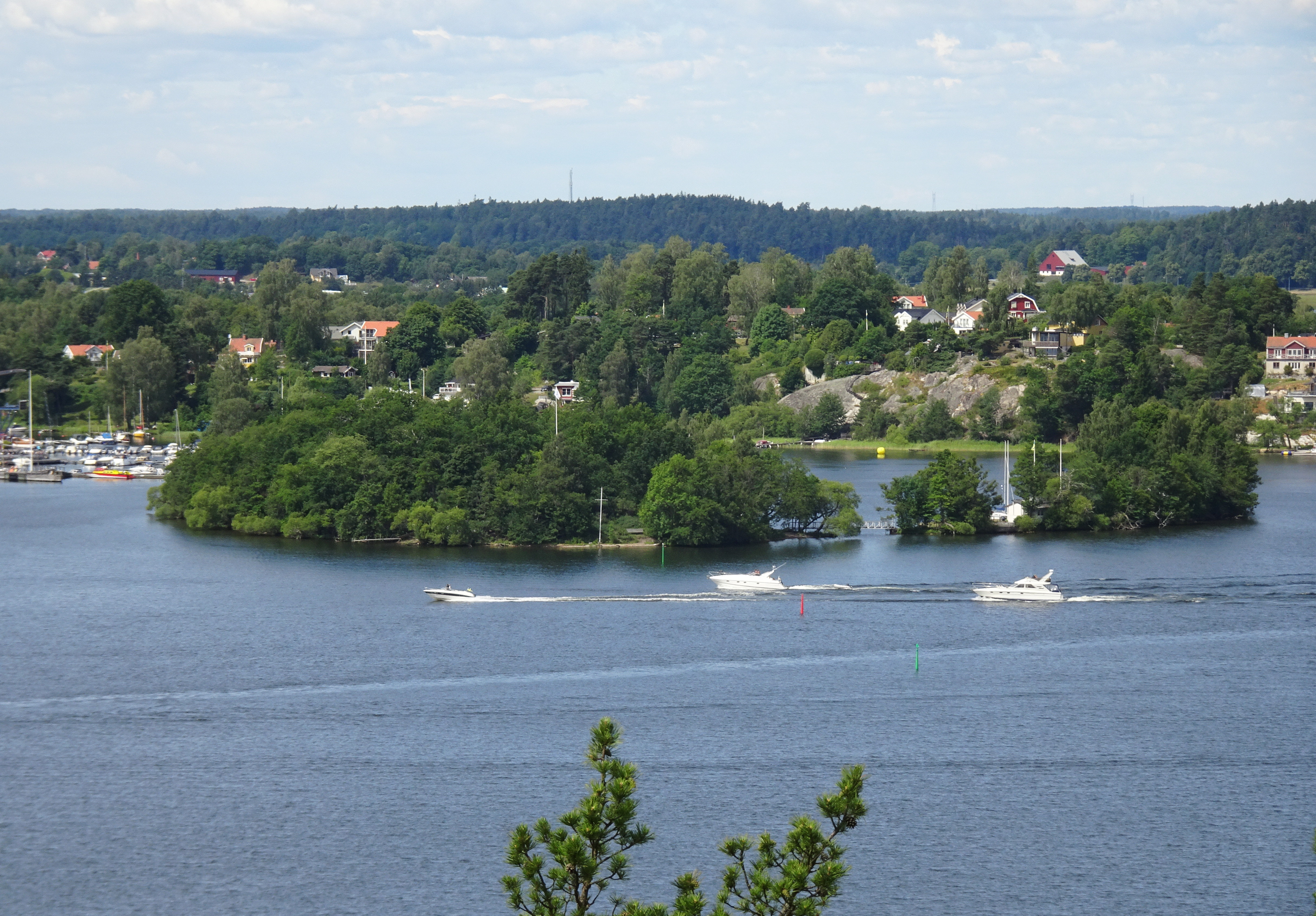 Jungfruholmarna